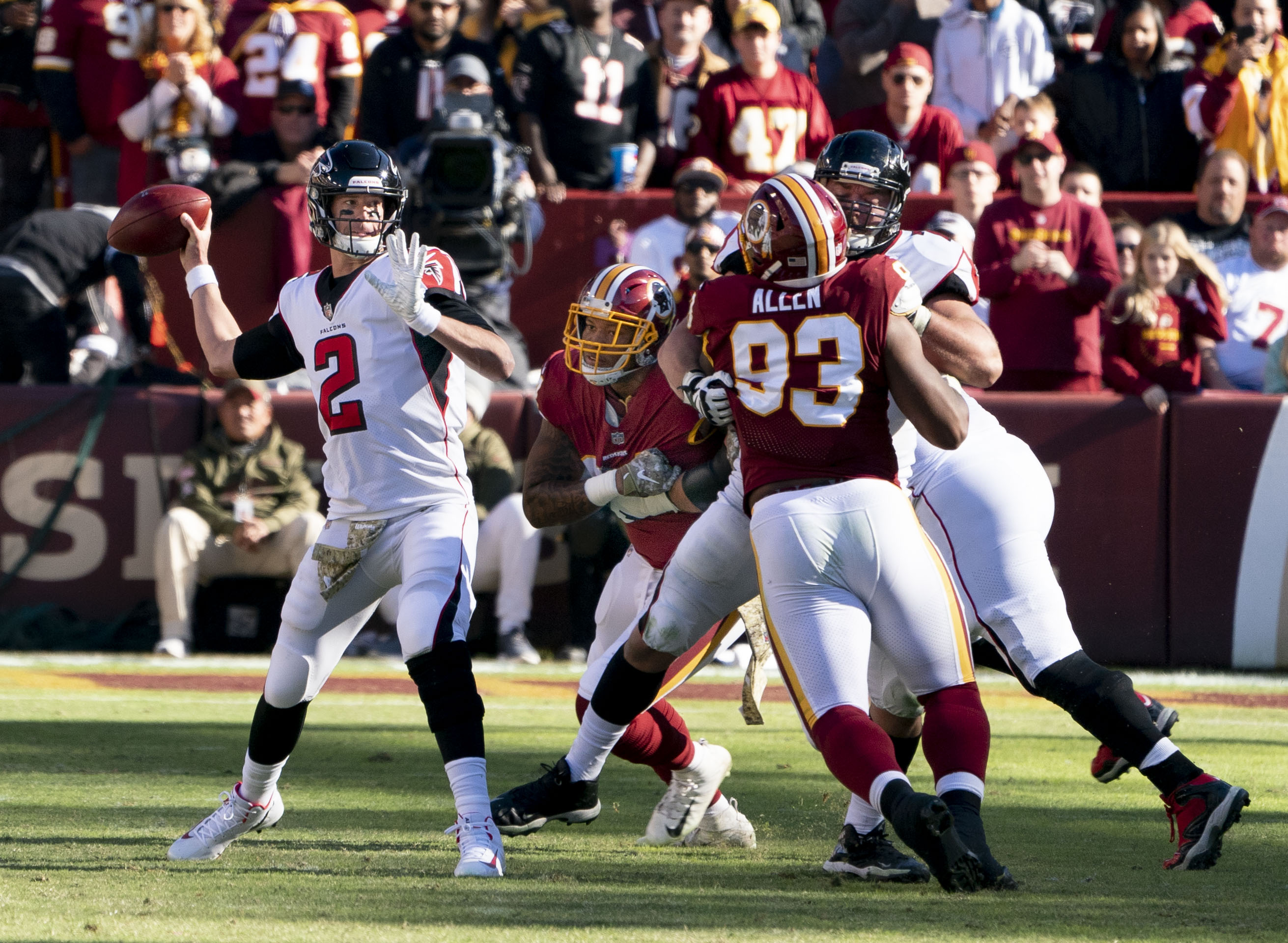 Falcons at Redskins 11/04/18